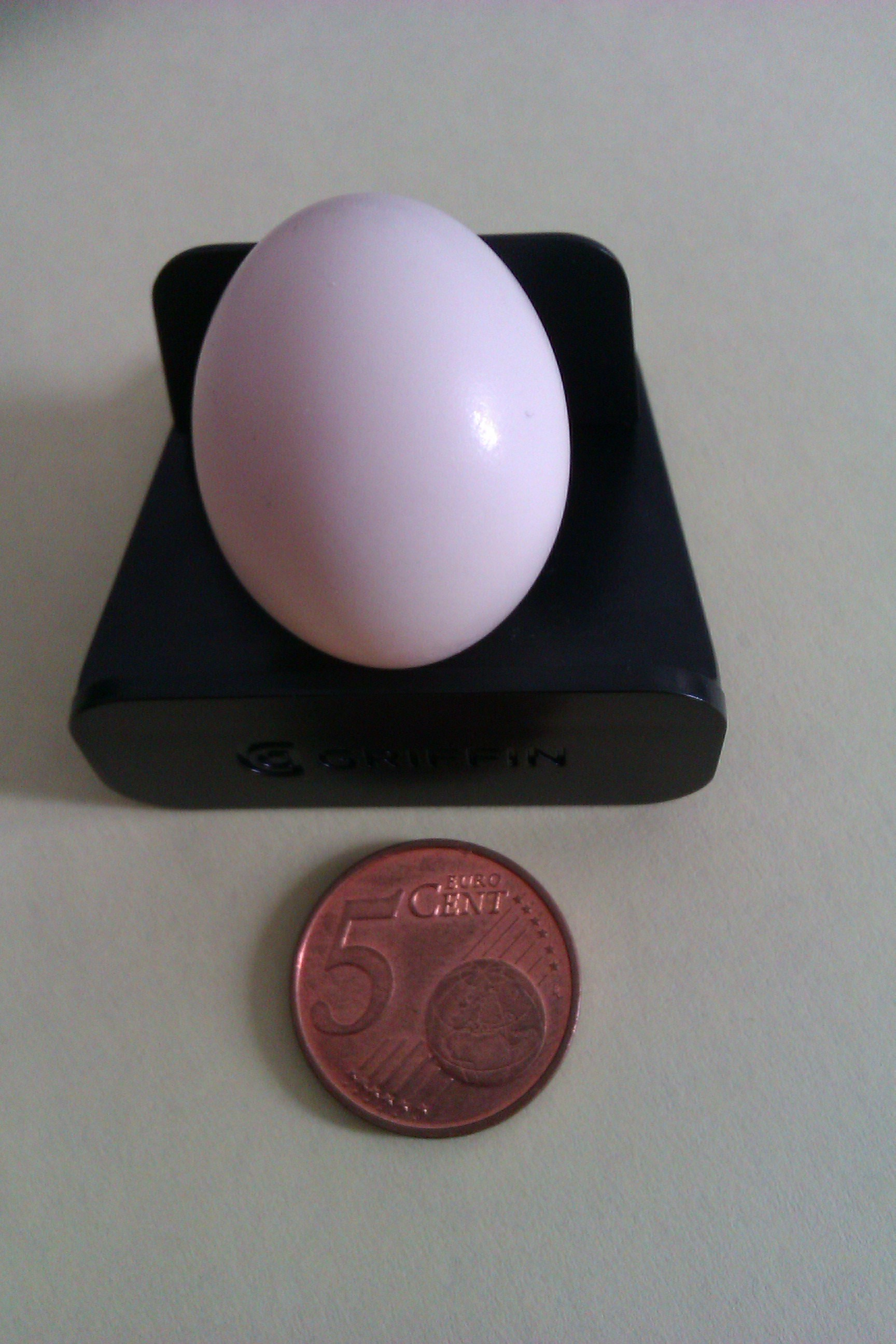 vergelijking grote van een Turks tortel duiven ei met een 5 euro cent munt